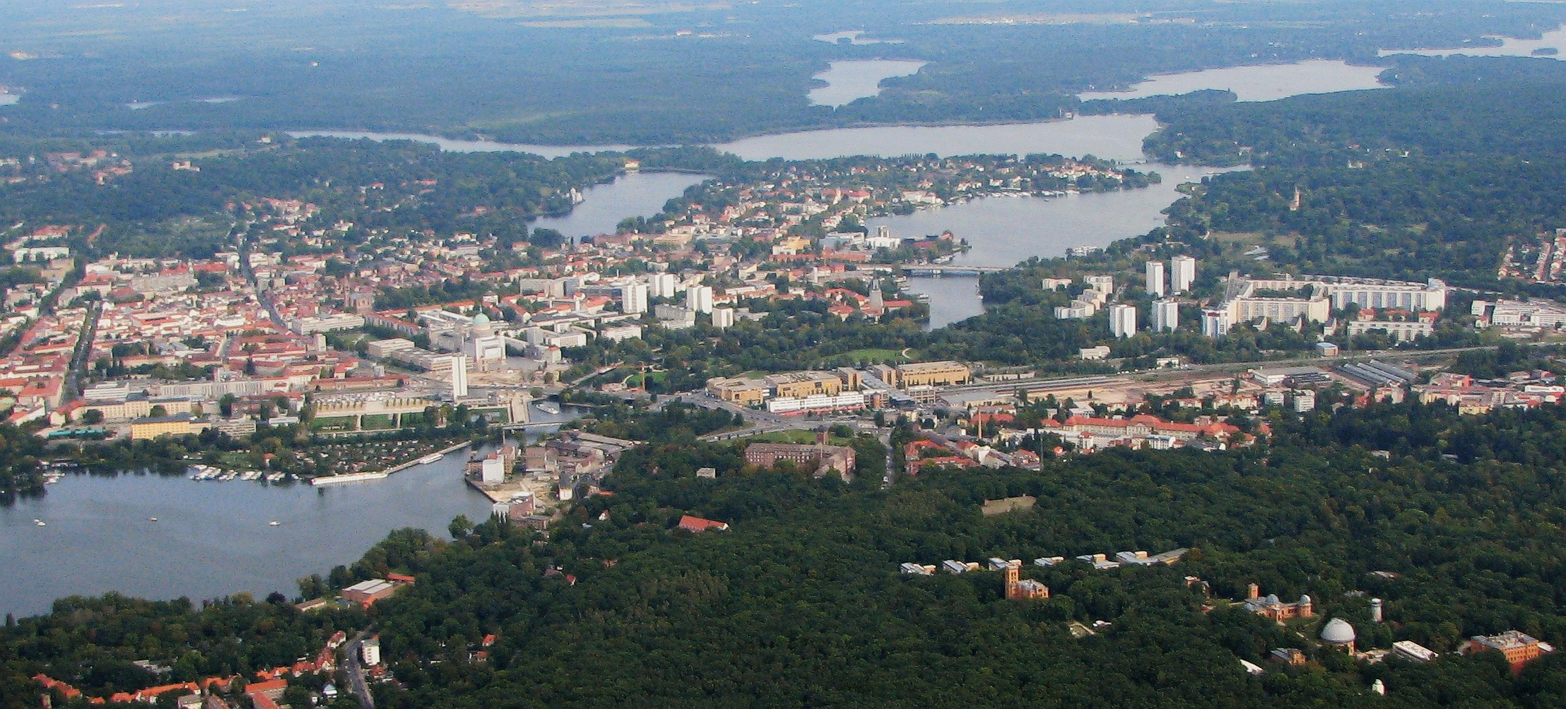 Die Landeshauptstadt von Brandenburg ist Potsdam - Luftbild Potsdam: im Vordergrund Leibniz-Institut für Astrophysik Potsdam, mittig der Landtag Brandenburg und der Hauptbahnhof mit Potsdam Center Nord, links das Zentrum.